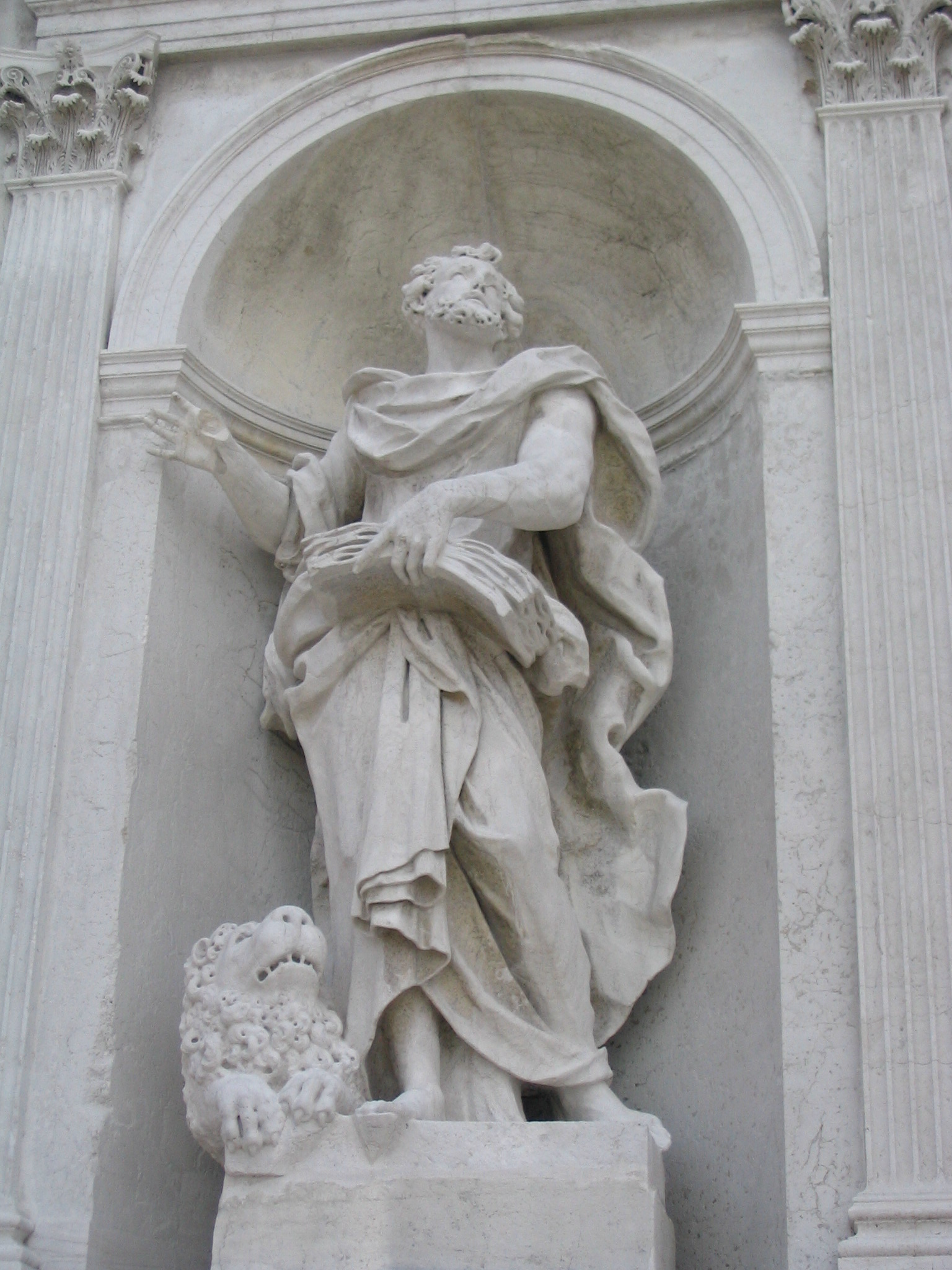 Statua dell'evangelista Marco, sulla facciata della Chiesa del Redentore a Venezia.